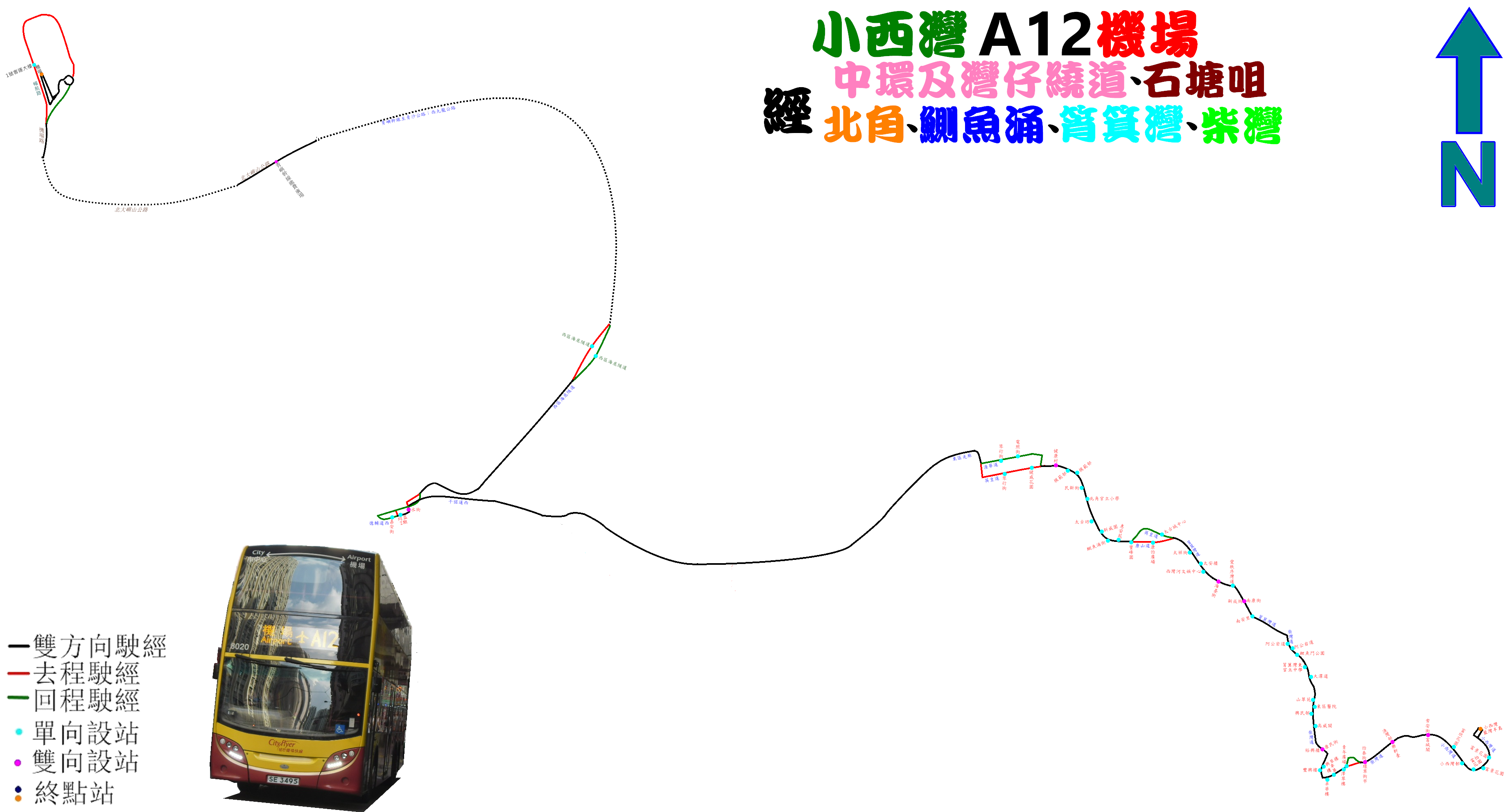 中文（香港）: 城巴機場快線A12路的走線圖